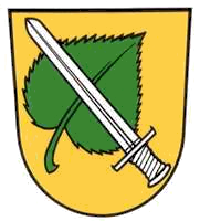 Wappen von Sickte